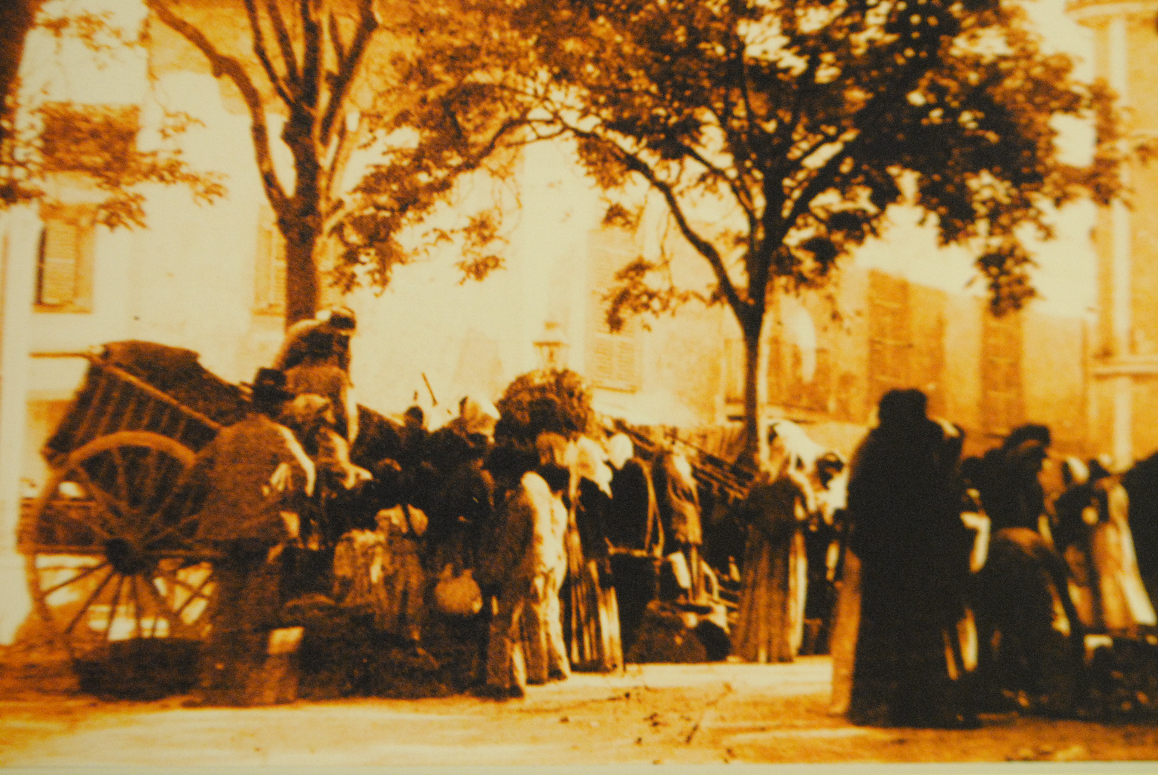 El mercat de Santa Maria a finals del segle XIX.